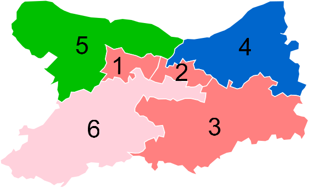 Résultats des élections législatives du Calvados en 2012